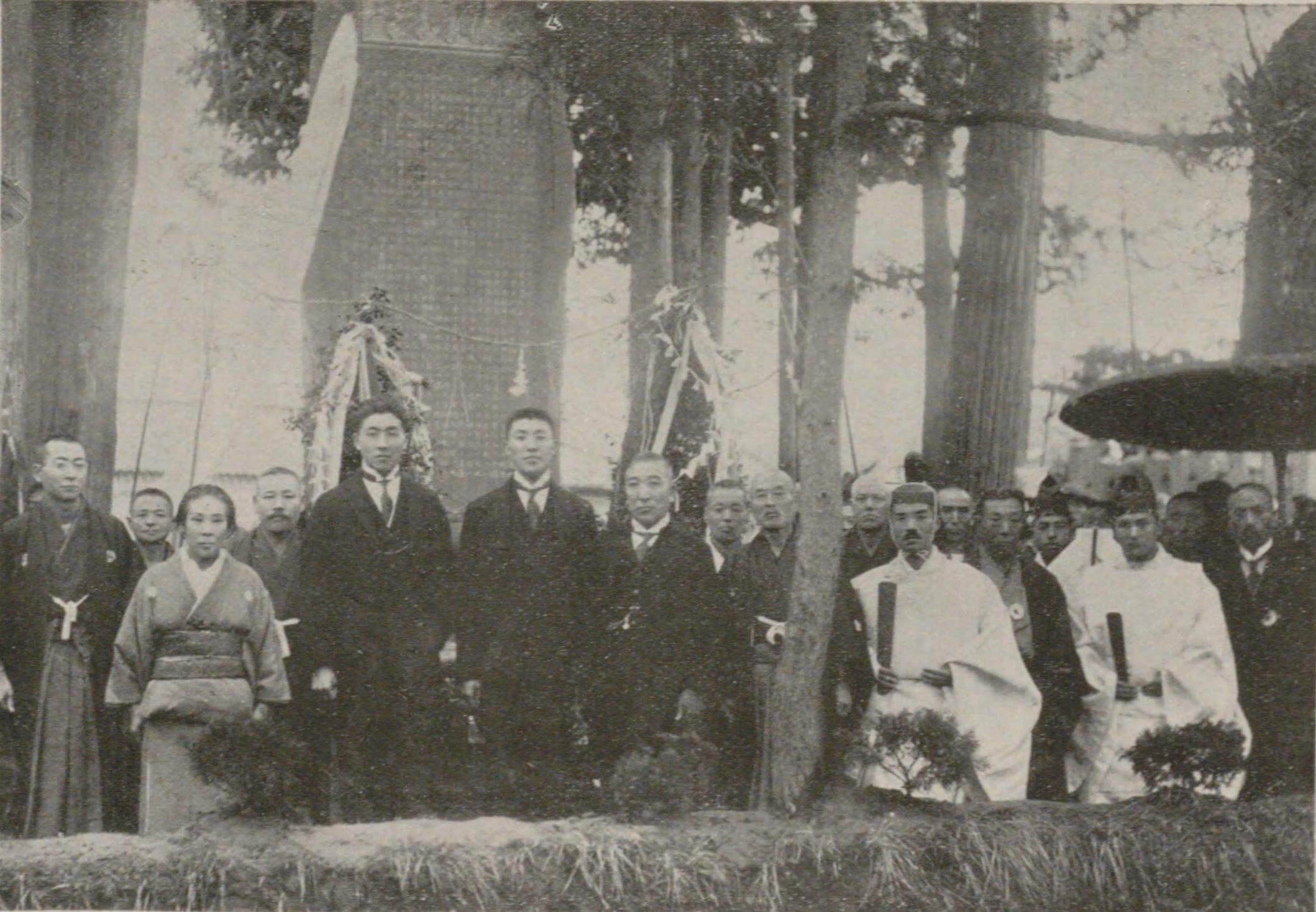 栗林得太郎の頌徳碑除幕式